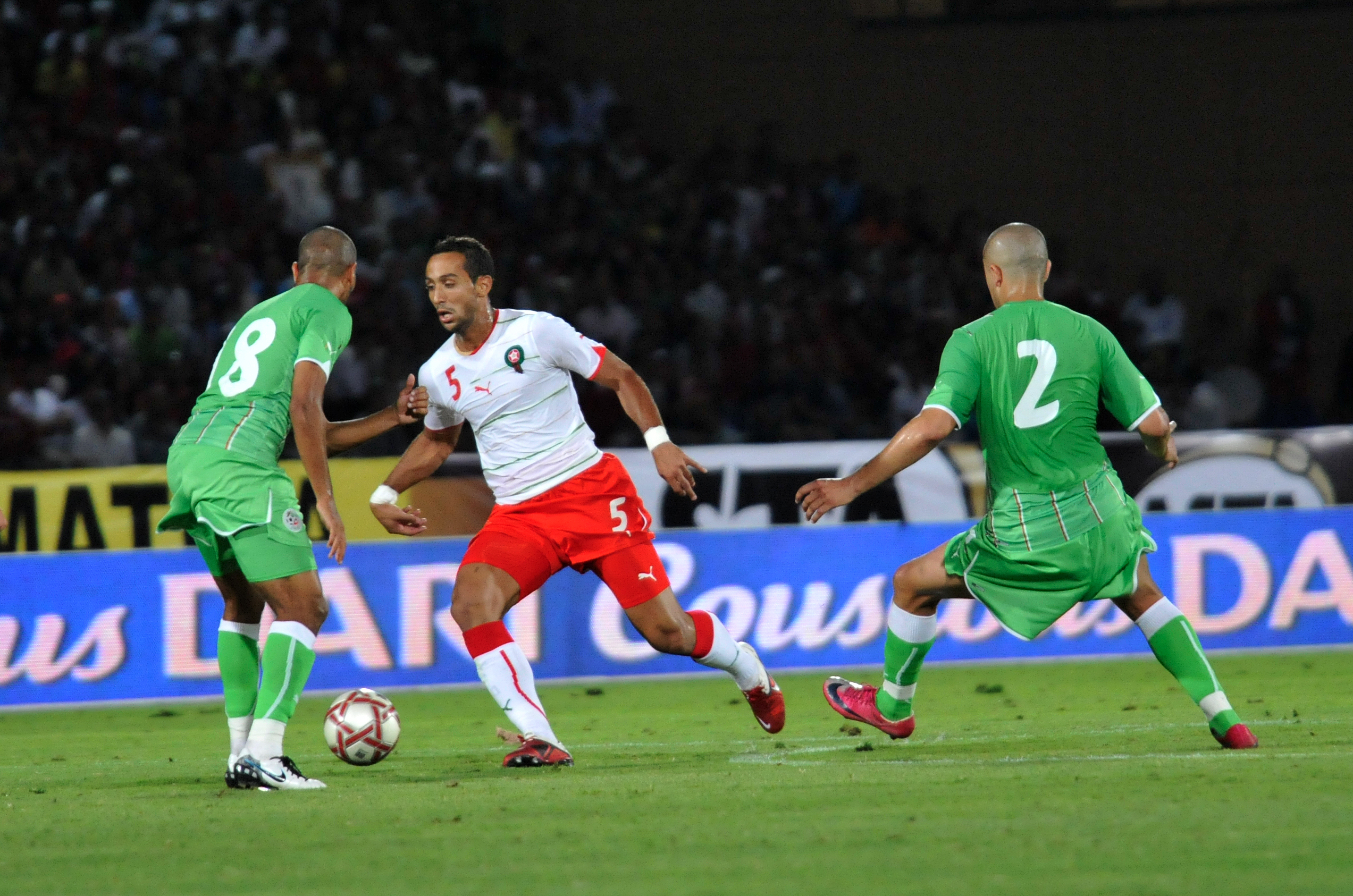 Match Maroc - Algérie